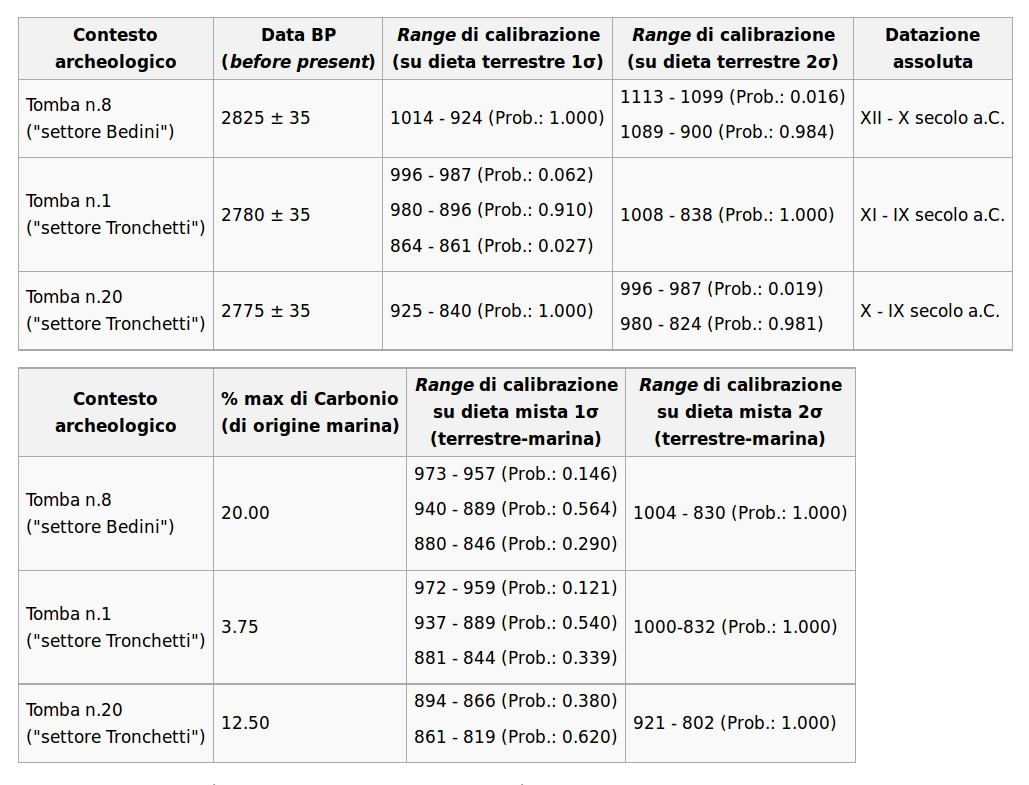 Tabella datazione C-14 resti ossei di Monte Prama eseguita da Luca Lai